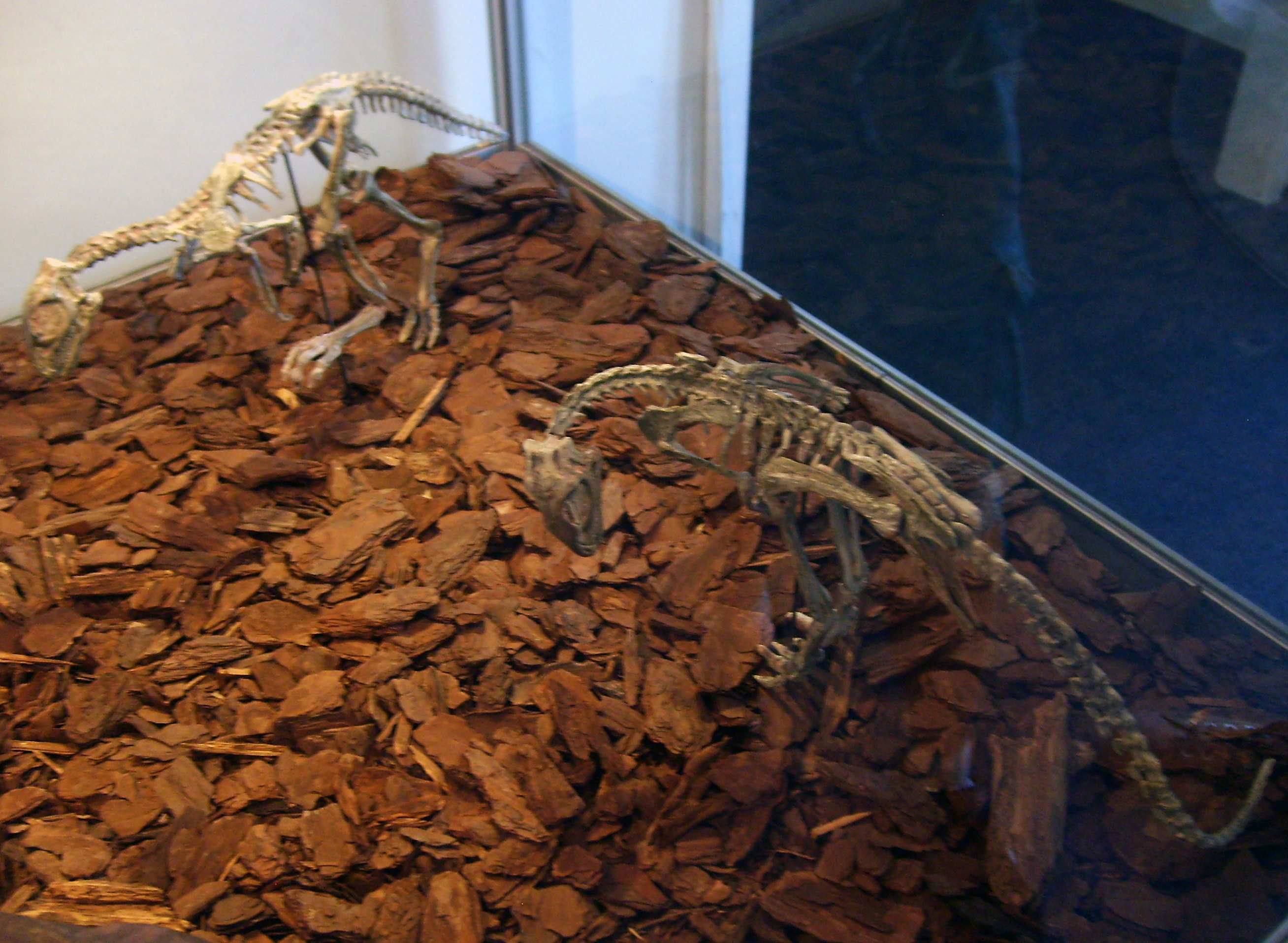 Gasparinisaura skeleton restorations, Copenhagen.